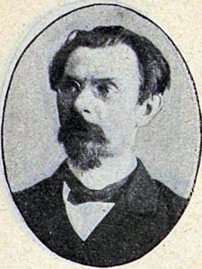 Иван Александрович Лебедев (1861, Архангельская губерния — после 1917) — мировой судья, депутат II Государственной думы Российской империи от Архангельской губернии (1907).